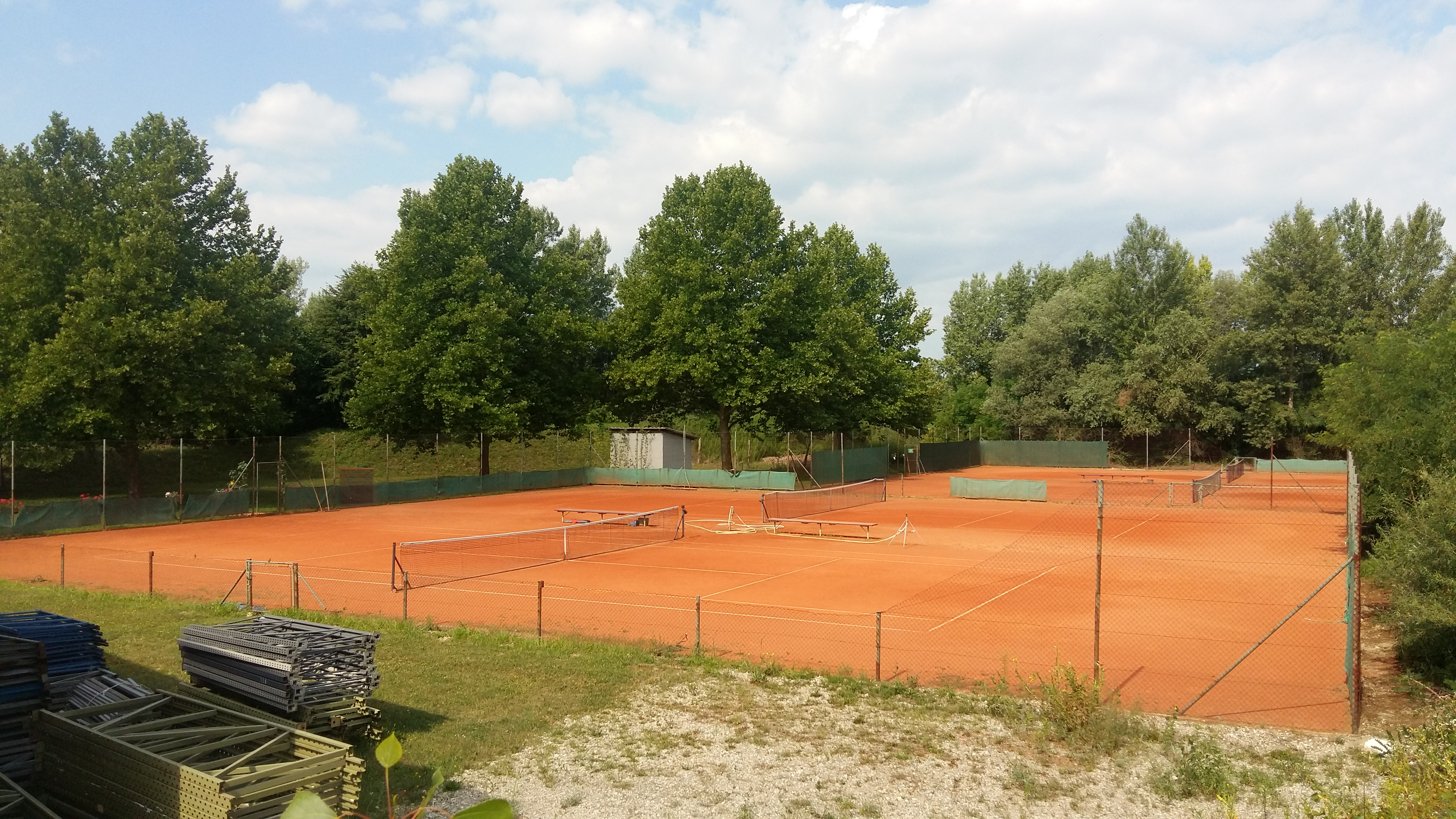 Hajdoše